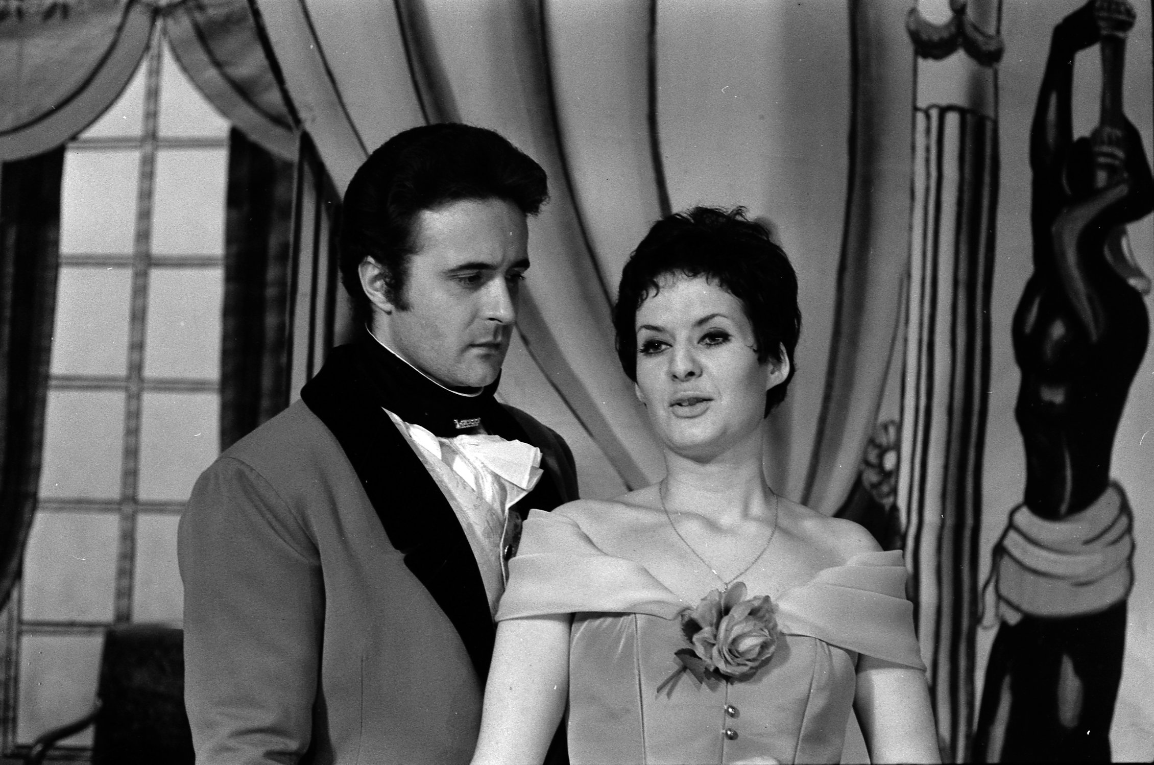 Théâtre du Capitole. Le 22 Décembre 1967. Vue de la représentation de l'opérette de La Castiglione au théâtre du Capitole.